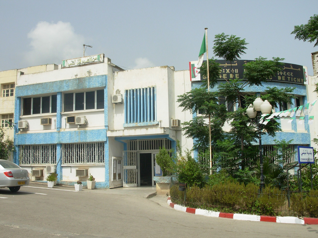 Siège APC Tichy